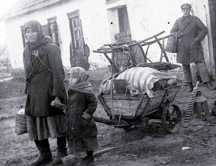 1930-е. Раскулаченная семья возле своего дома в с. Удачное Донецкой области